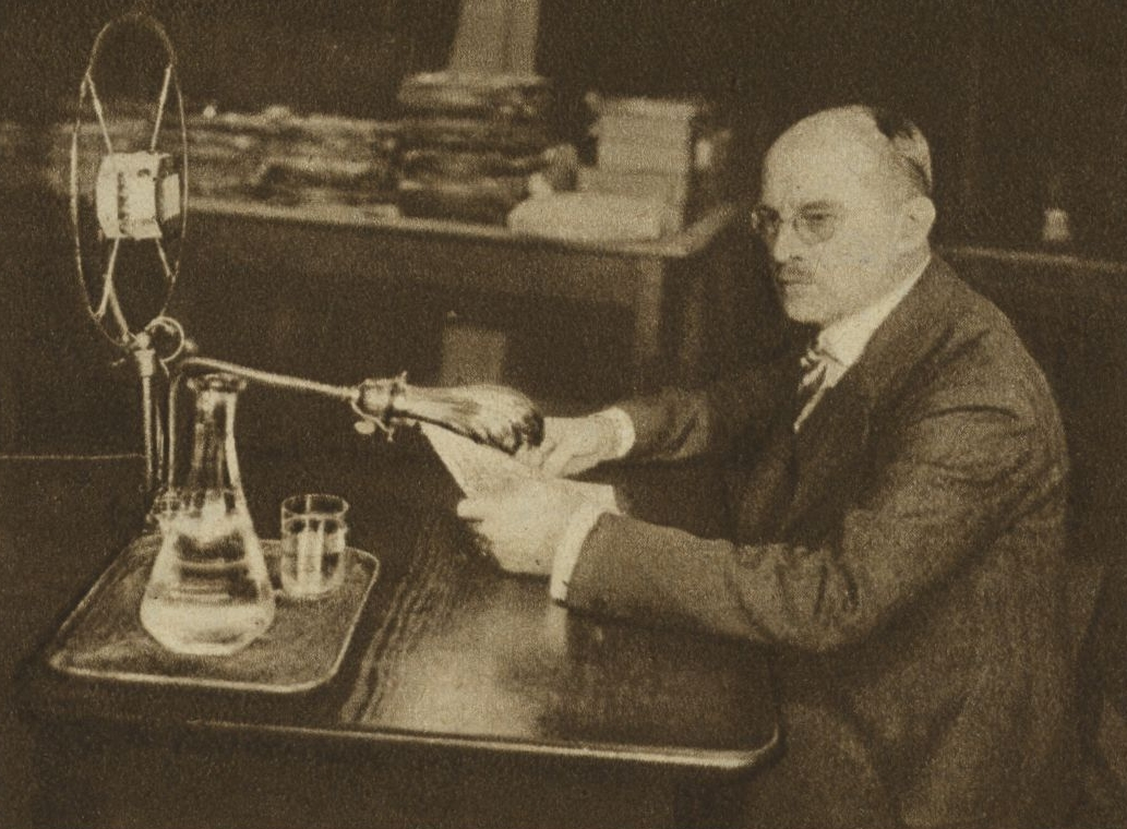 Heinrich von Srbik (1878–1951), österreichischer Historiker und Hochschullehrer.Das Foto zeigt ihn während einer Aufnahme im Studio der RAVAG am 21. März 1930.